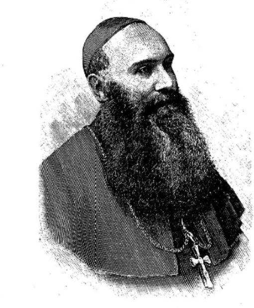 Portrait de Mgr Drure qui vient d'étre nommé archevâque de Bagdad, publié en 1903 dans les Annales de la propagation de la foi.